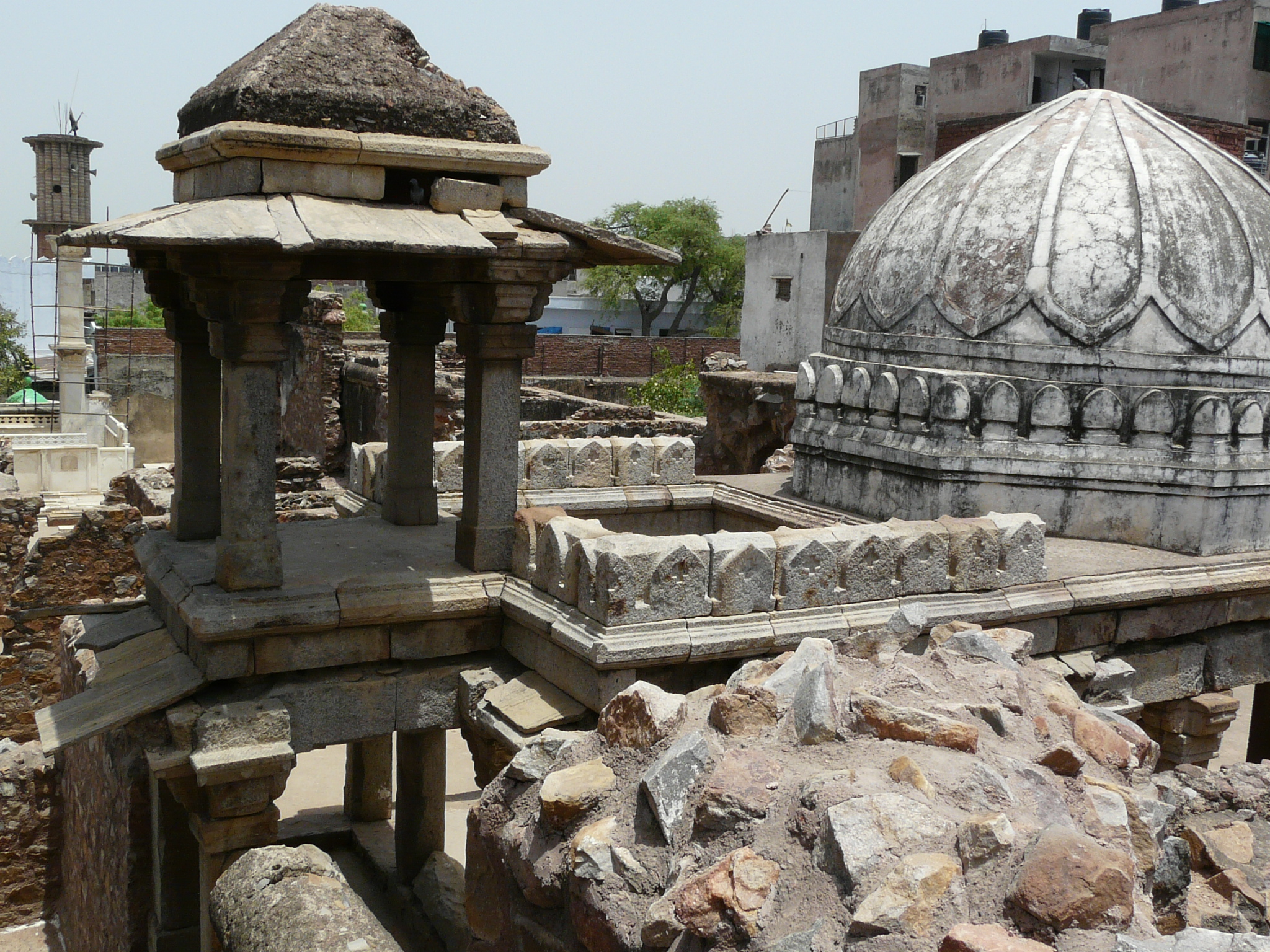 Zafar Mahal remains